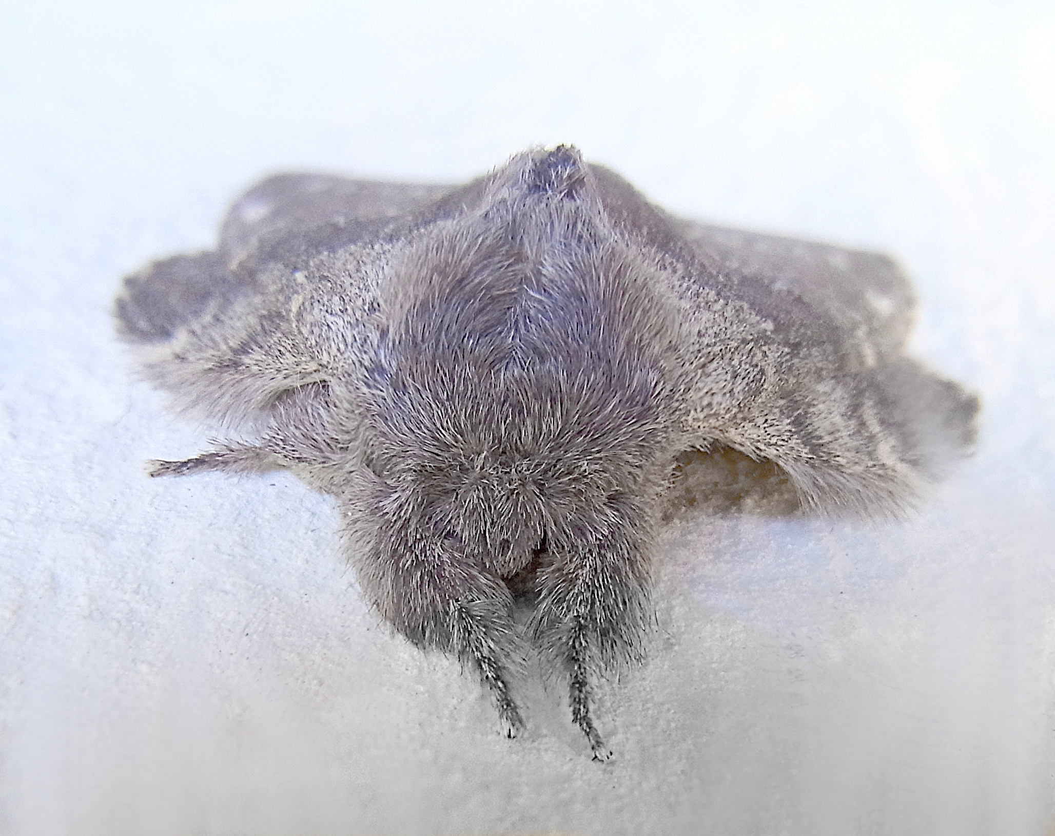 Stauropus fagi aus Ungarn, Bükk-Berge bei Lilafüred am 10. Juli 2015